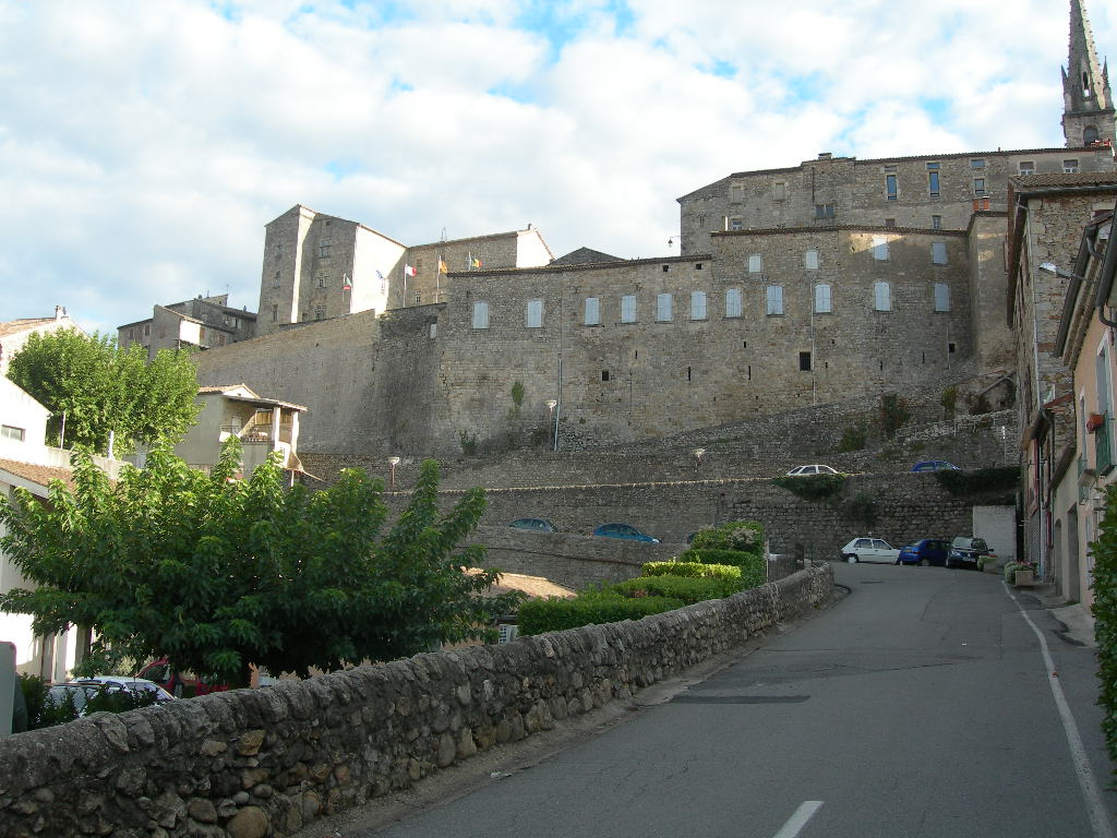 Vue du château de Joyeuse et des remparts.